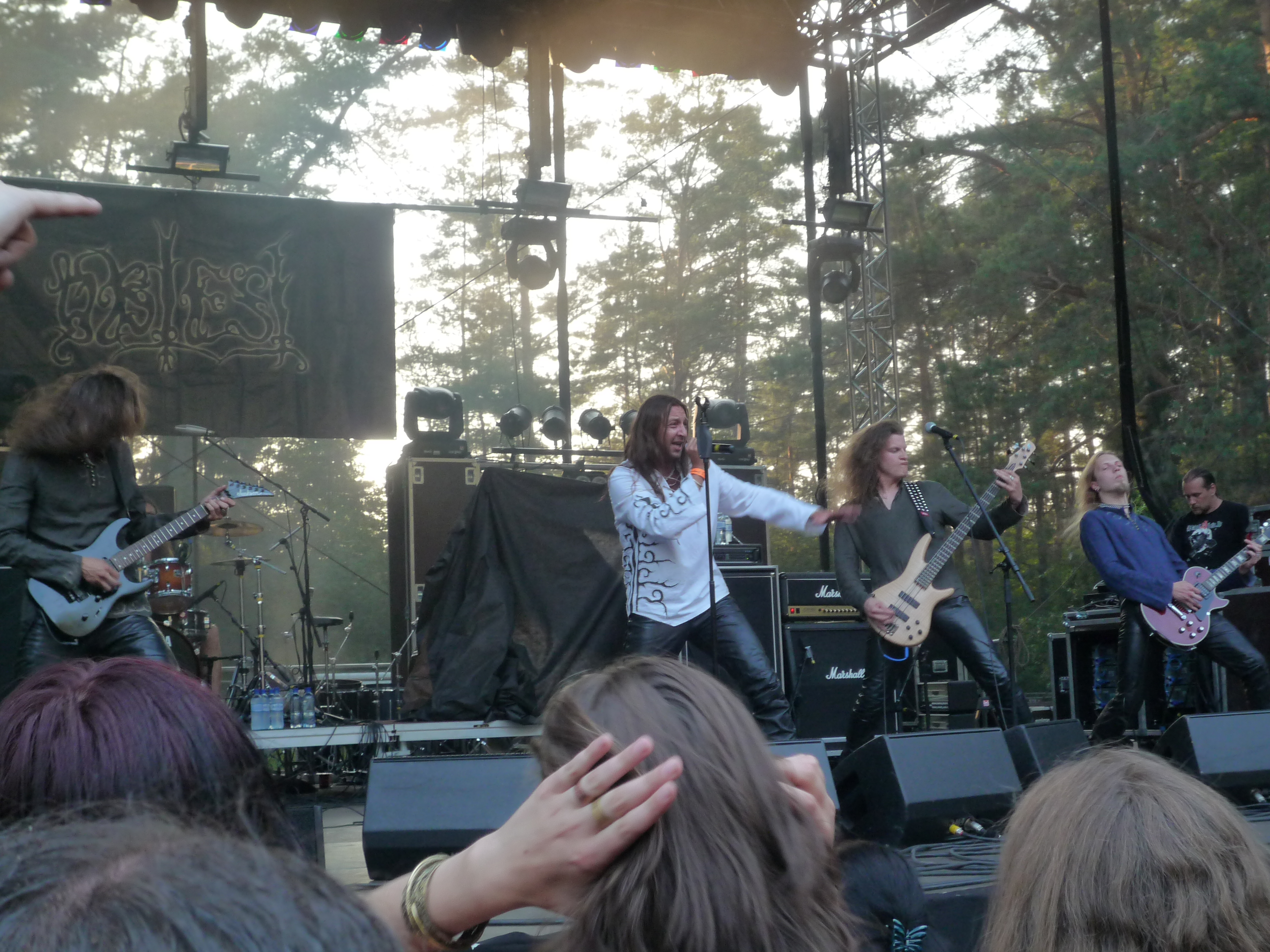 Pagoniško metalo grupė Obtest festivalyje Velnio akmuo